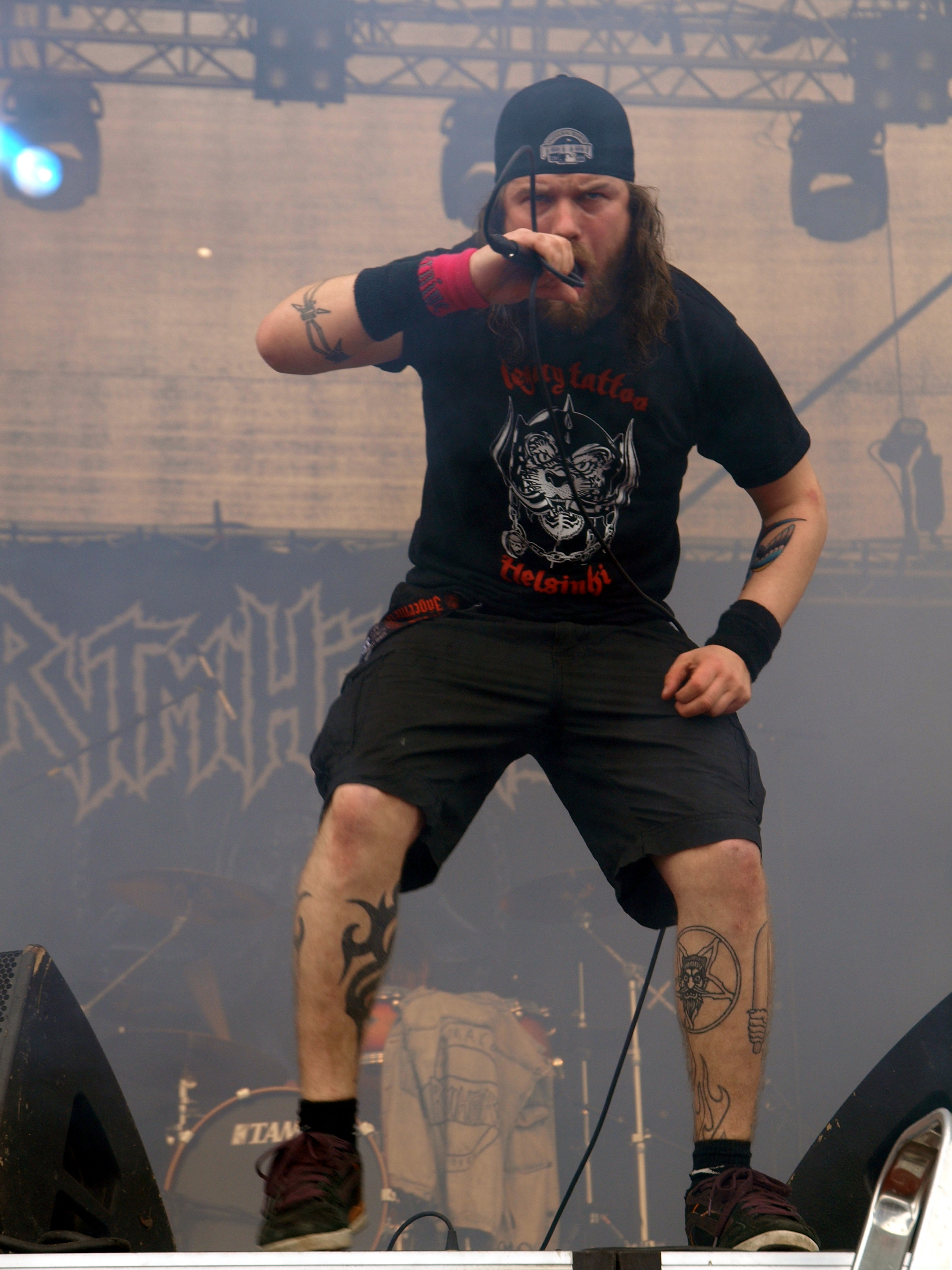 Rytmihäiriö live am Myötätuulirock 2011